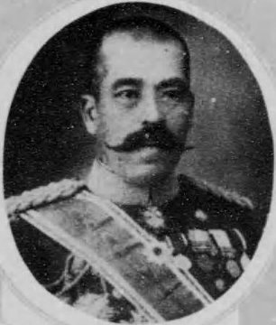 内山小二郎